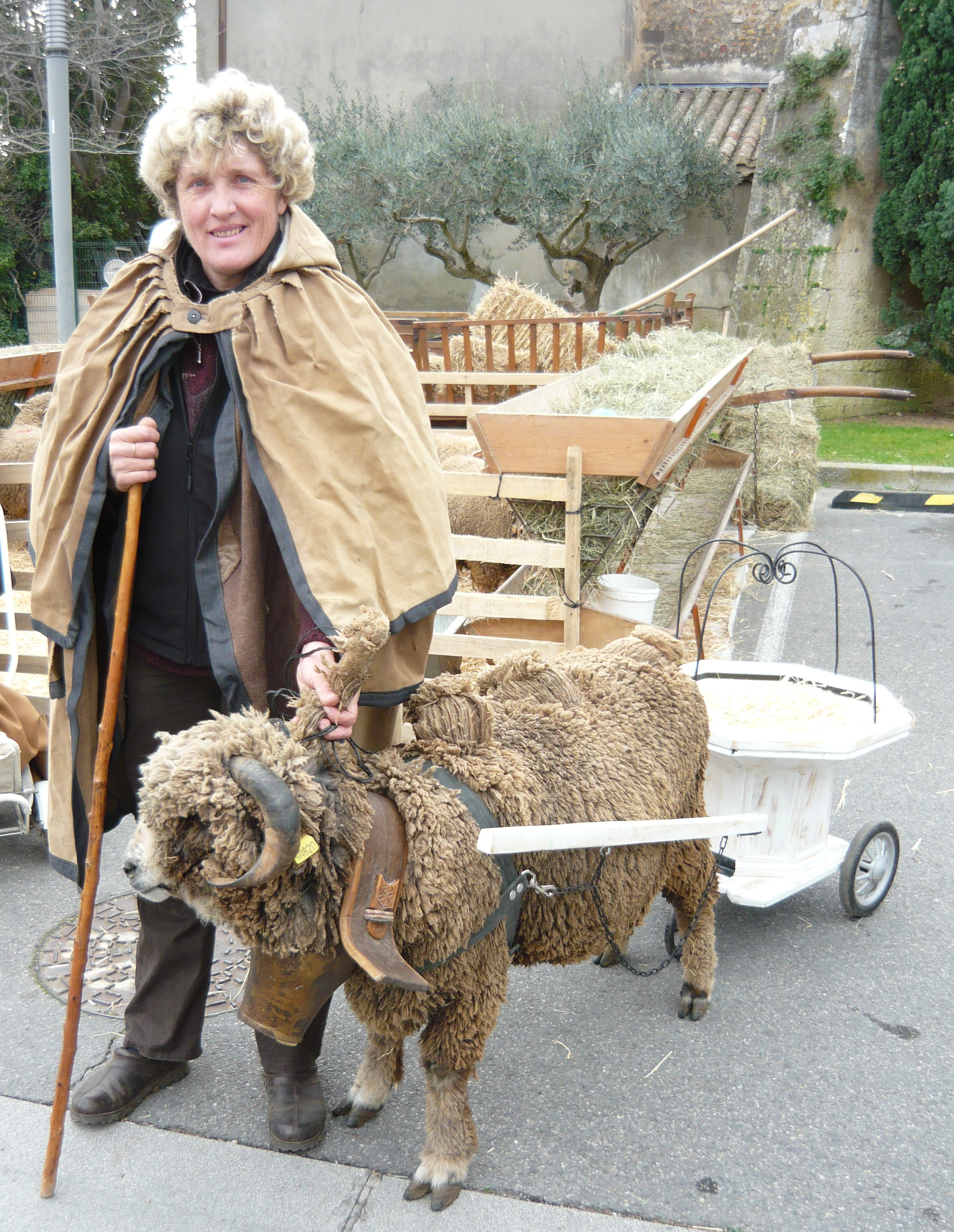 Bergère et son flouca lors d'un pastrage